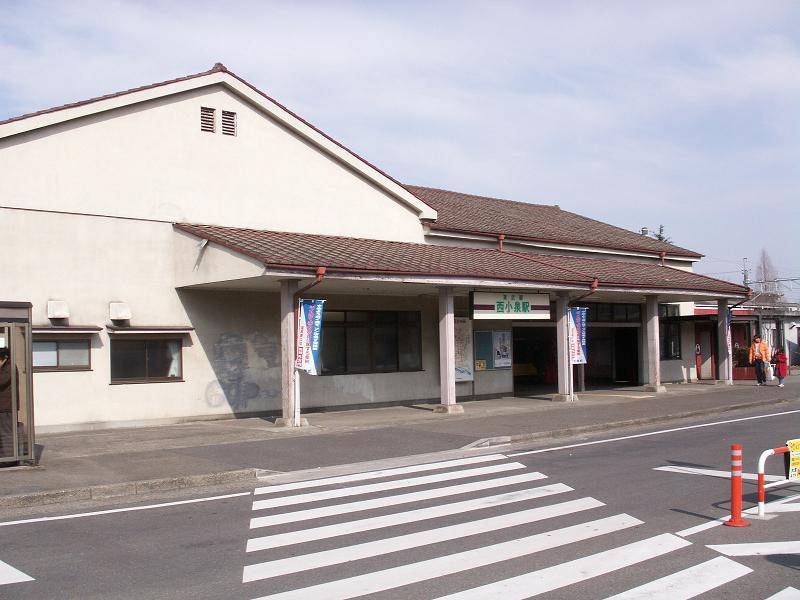 西小泉駅（2006年3月、投稿者Jnr bus撮影）